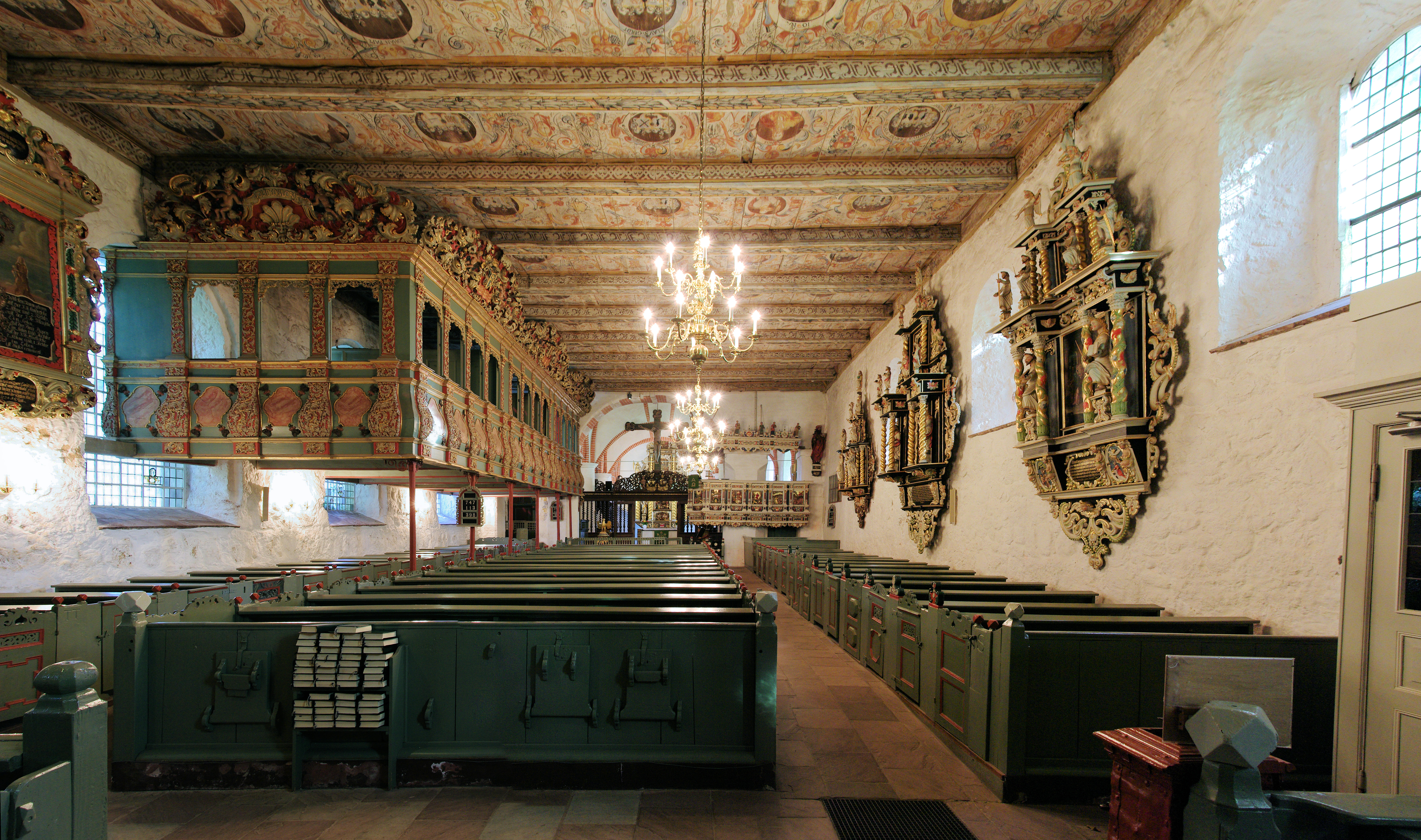 Blick in die Kirche von der Oregel aus (Panorma aus 3 Bildern)